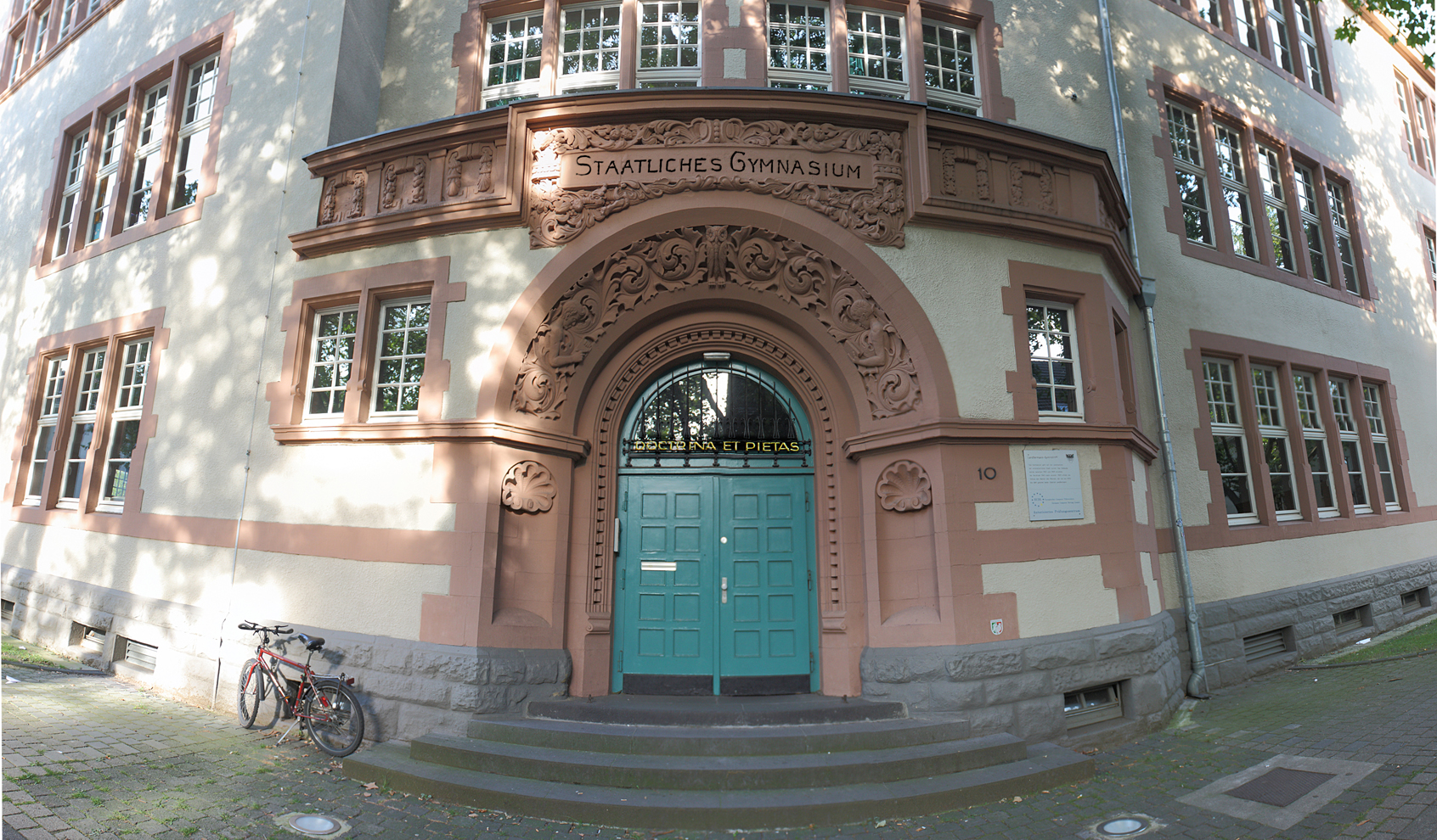 Panorama vom Eingang des Landfermann-Gymnasiums in Duisburg